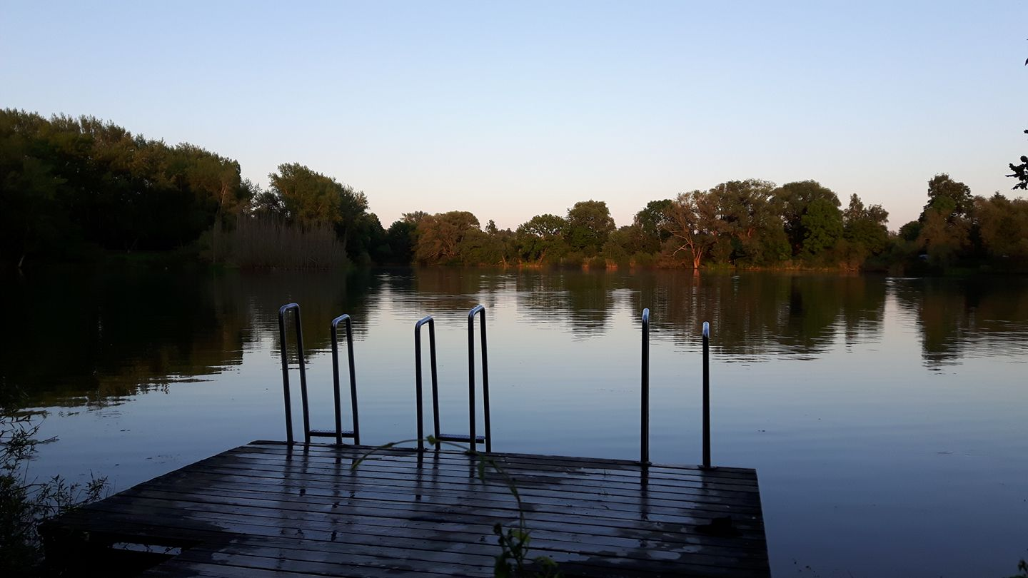 Der Siebenmeterteich ist ein Baggersee in Hannover Döhren, entstanden durch Kiesabbau Mitte des 20. Jahrhunderts. Er ist Teil der Ricklinger Kiesteiche, die teils in Döhren, teils im Stadtteil Ricklingen liegen. Diese Baggerseen wurden in den 1970er Jahren in eine naturnahe Erholungslandschaft umgestaltet. Der Siebenmeterteich wird hauptsächlich als FKK-Badeteich und für die Sportfischerei genutzt.